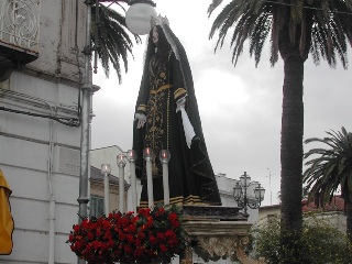 autore nasso vincenzo. fonte nasso vincenzo. momento della processione dei misteri Licensing rilasciata sotto licenza Creative commons attribution requireda share alike con ticket Ticket#2008040510008971 da